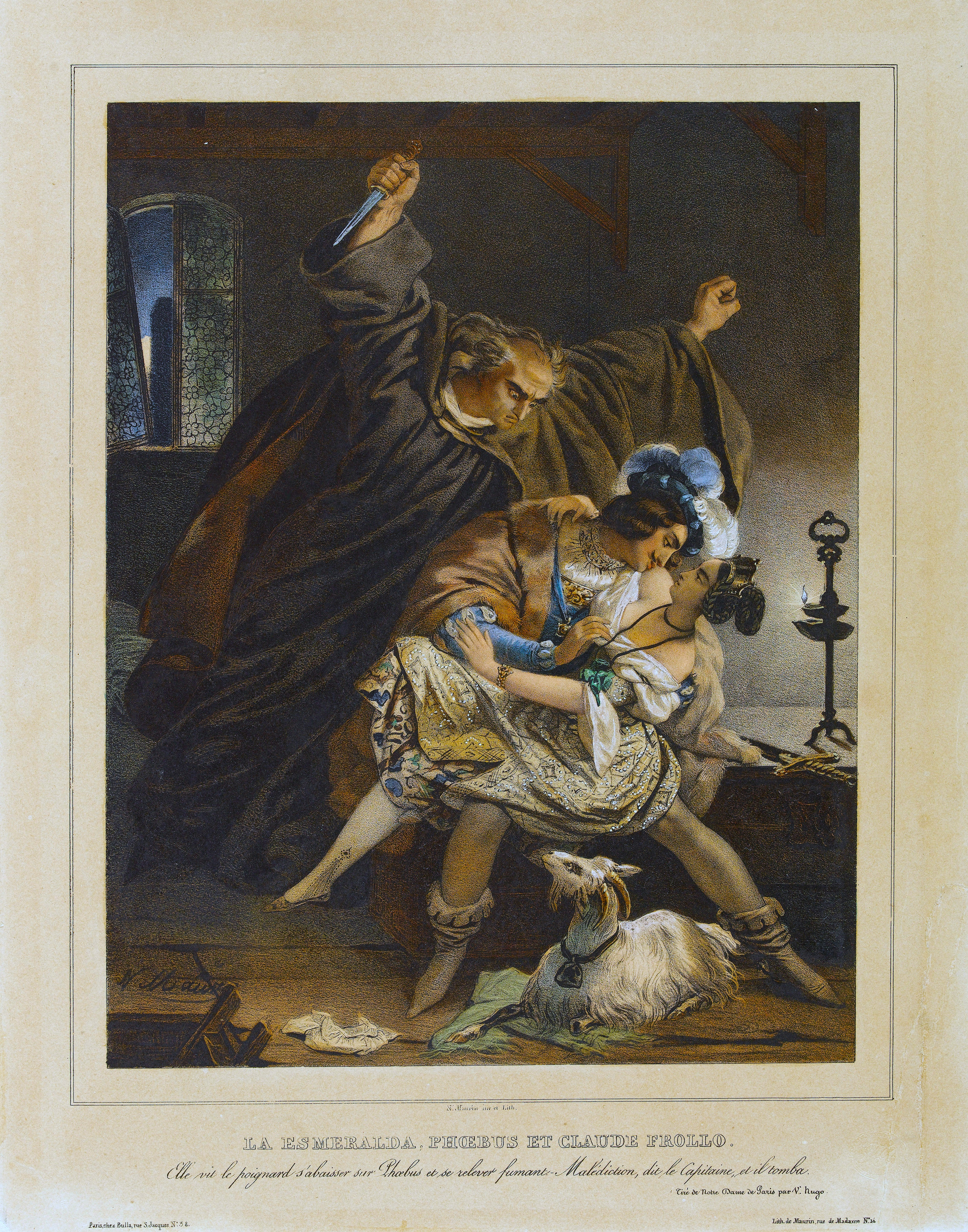 Fou de jalousie, Claude Frollo s'apprête à poignarder Phœbus de Châteaupers tandis que ce dernier enlace la Esmeralda. Lithographie de Nicolas Eustache Maurin, 1834.